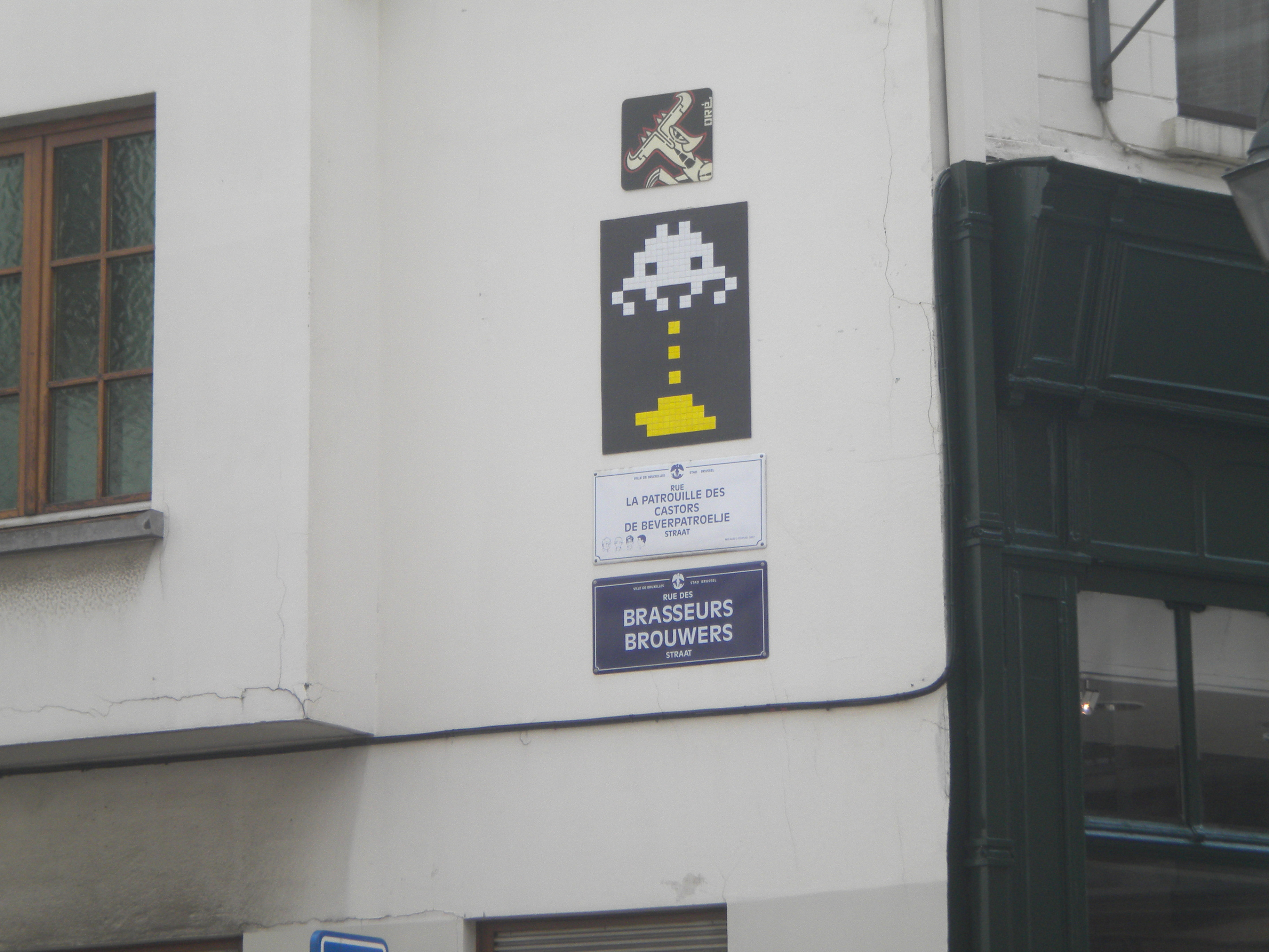 Plaque de la rue La Patrouille des Castors à Bruxelles.